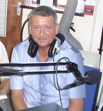 Tim Grundy (cut image)